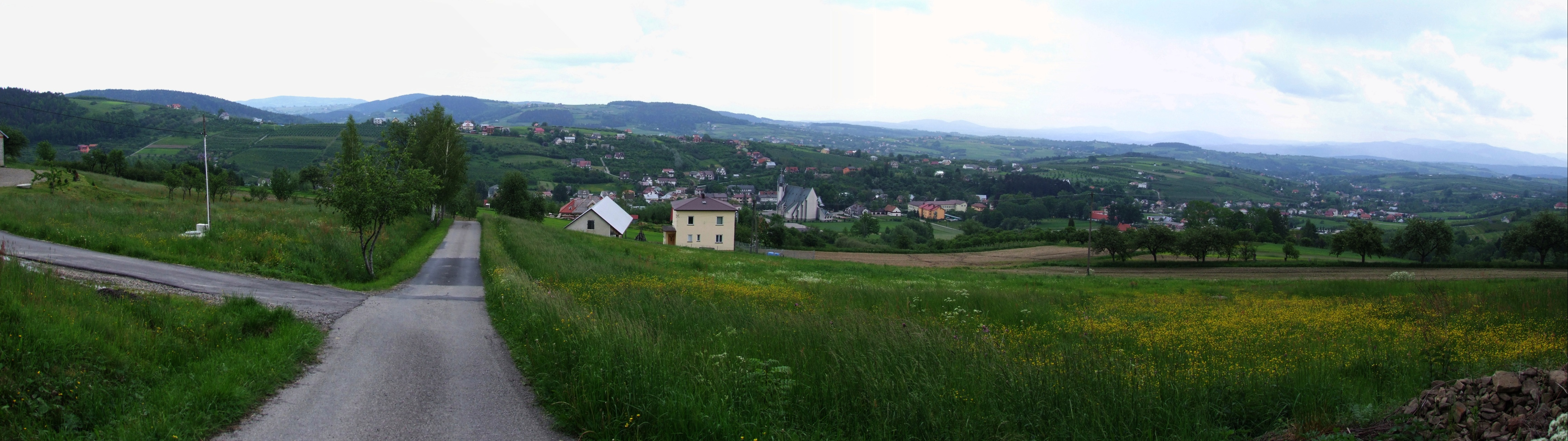 Jerzy Opioła